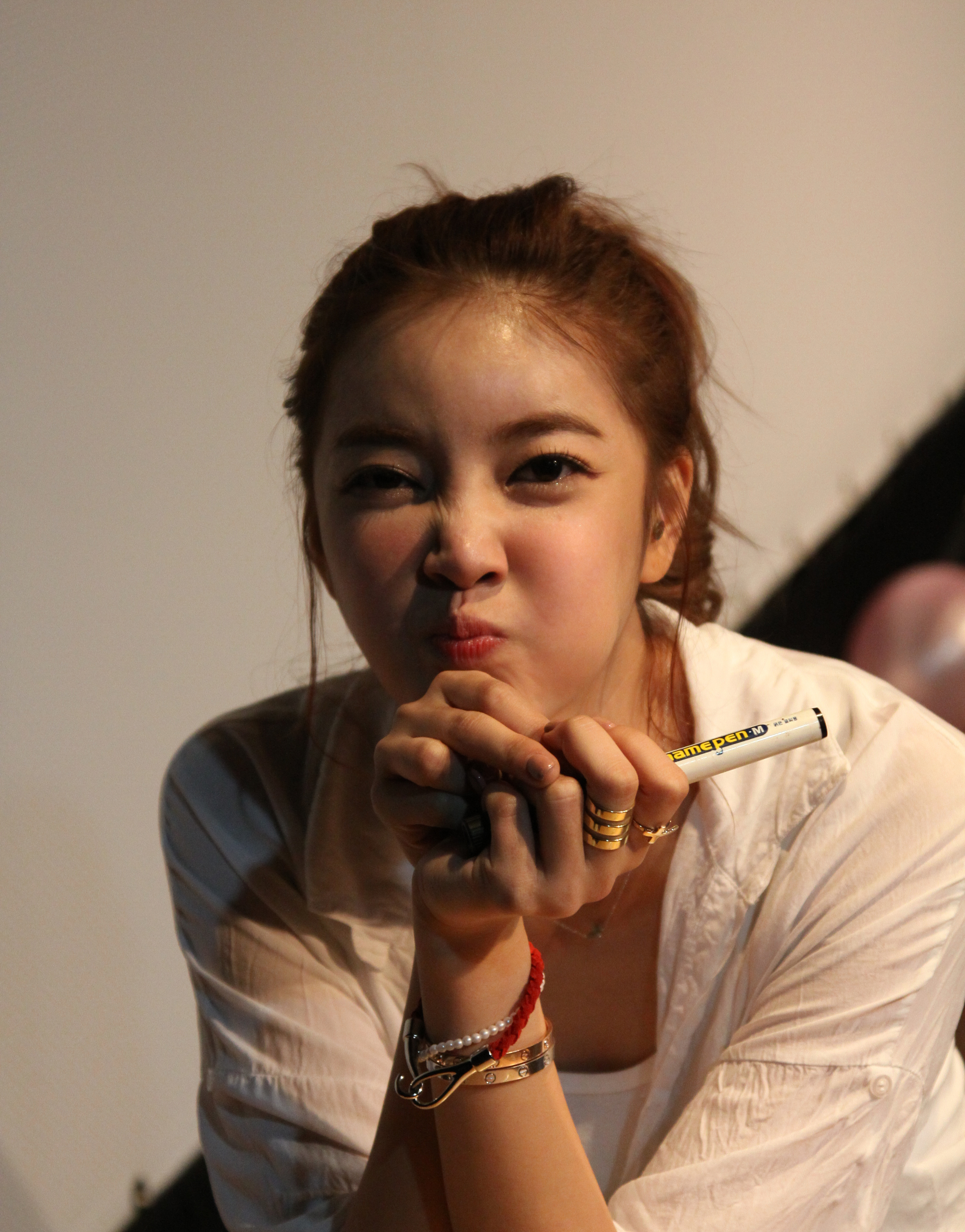 NS윤지 2013 팬미팅 사진